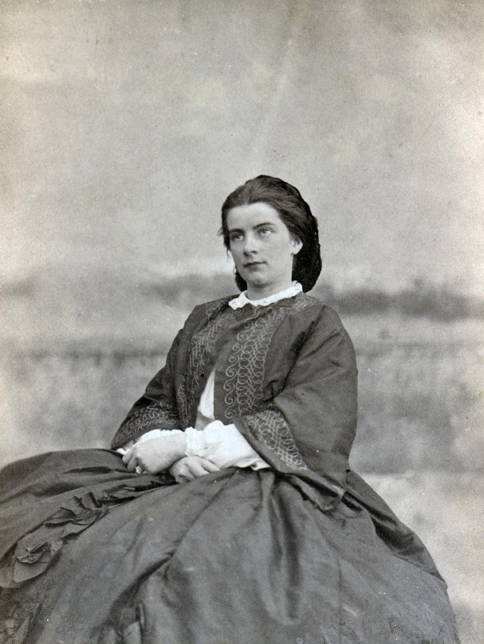 Marie, Prinzessin in Bayern-Gelnhausen